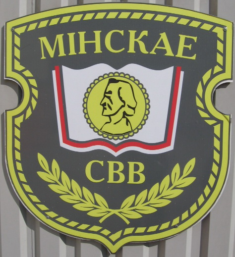 Знак отличия Минского военного суворовского училища